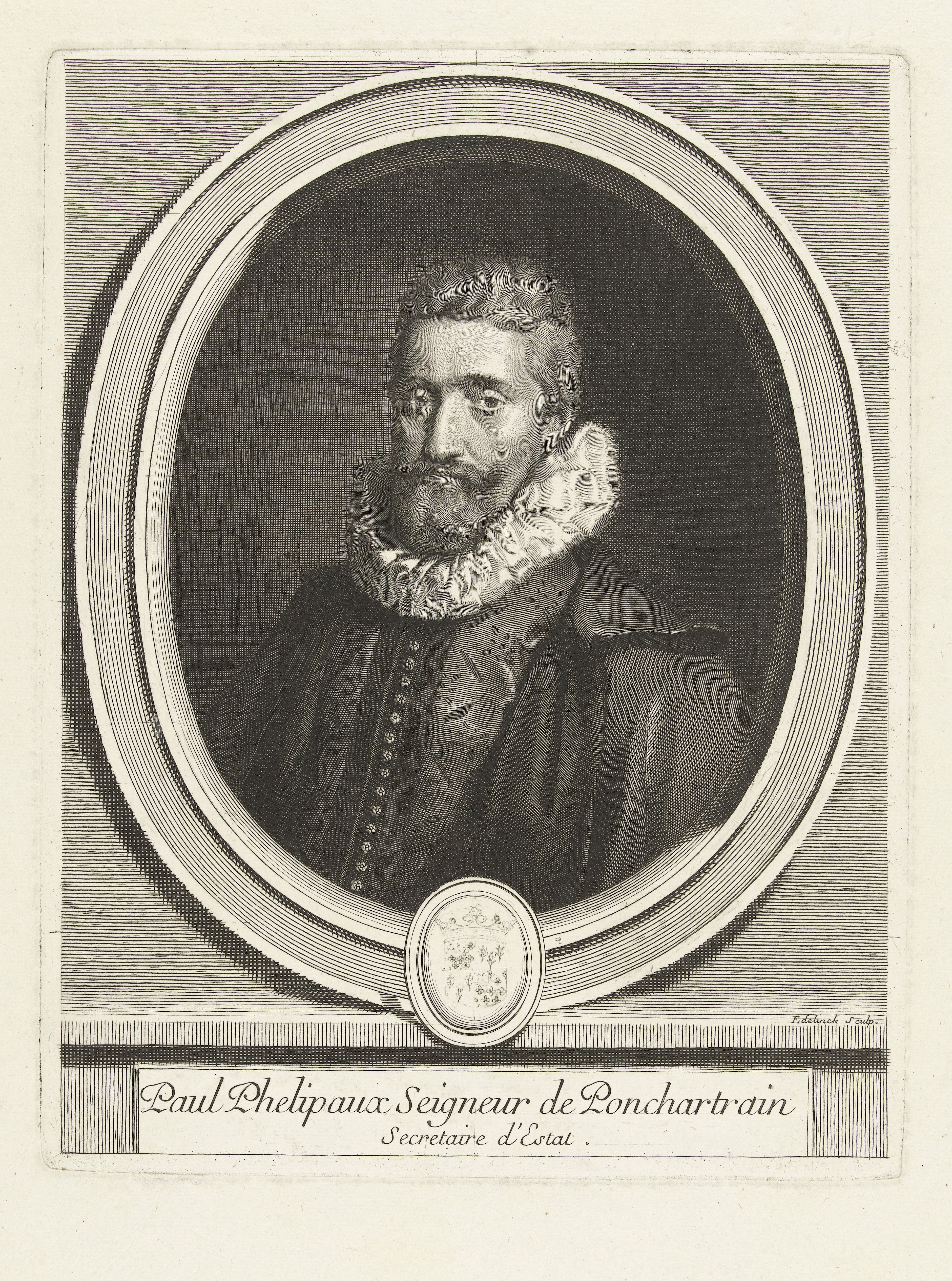 IdentificatieTitel(s): Portret van Paul PhélypeauxPaul Phelipaux Seigneur de Ponchartrain (titel op object)Objecttype: prent Objectnummer: RP-P-BI-7582Catalogusreferentie: Robert-Dumesnil 300-1(3)Opmerking: maar met het opschrift van de derde staatOpschriften / Merken: verzamelaarsmerk, verso, gestempeld: Lugt 240Omschrijving: Portret van de Franse staatsman Paul Phélypeaux (1569-1621), afgebeeld in ovale omlijsting met wapen.VervaardigingVervaardiger: prentmaker: Gerard Edelinck (vermeld op object)verlener van privilege:Plaats vervaardiging: Frankrijk (mogelijk)Datering: 1652 - 1707Fysieke kenmerken: gravureMateriaal: papier Techniek: graveren (drukprocedé)Afmetingen: plaatrand: h 252 mm × b 193 mmOnderwerpWie: Paul Phélypeaux de PonchartrainVerwerving en rechtenVerwerving: overdracht van beheer 1816Copyright: Publiek domein